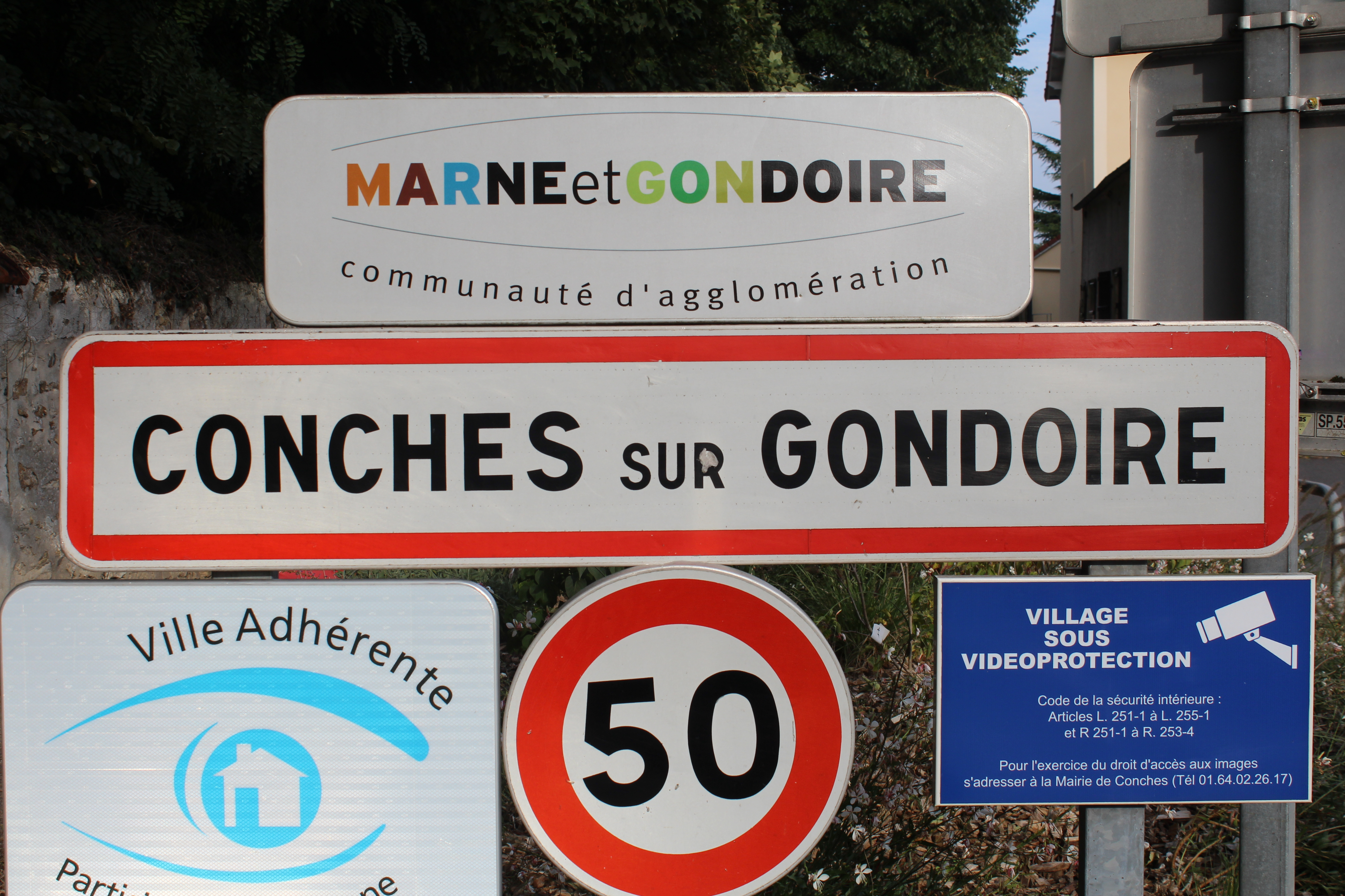 Panneau d'entrée dans Conches-sur-Gondoire.